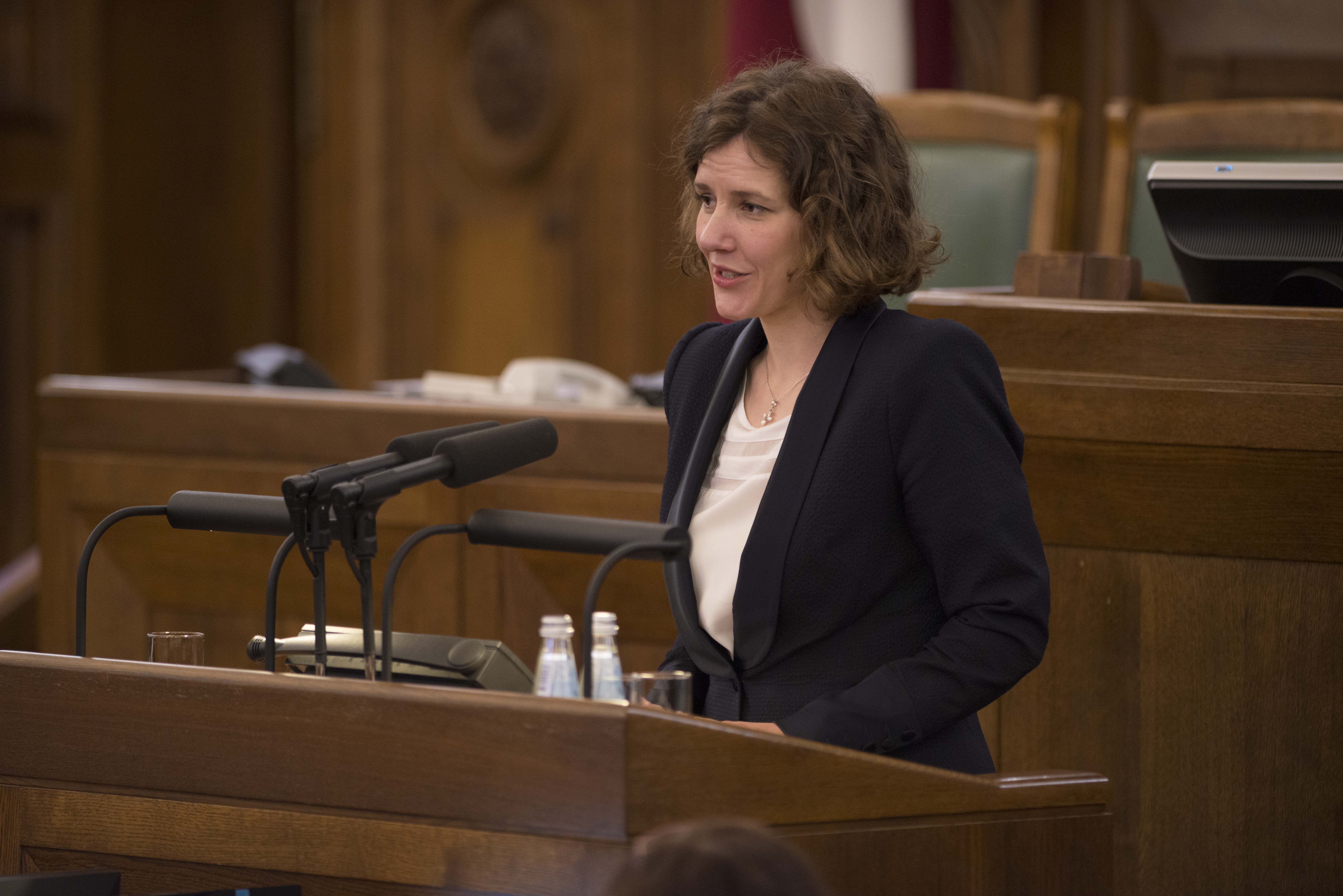 2014.gada 4.novembris. Deputāte Dana Reizniece-Ozola dod svinīgo solījumu. Foto: Juris Vīgulis, Saeimas Kanceleja Izmantošanas noteikumi: saeima.lv/lv/autortiesibas